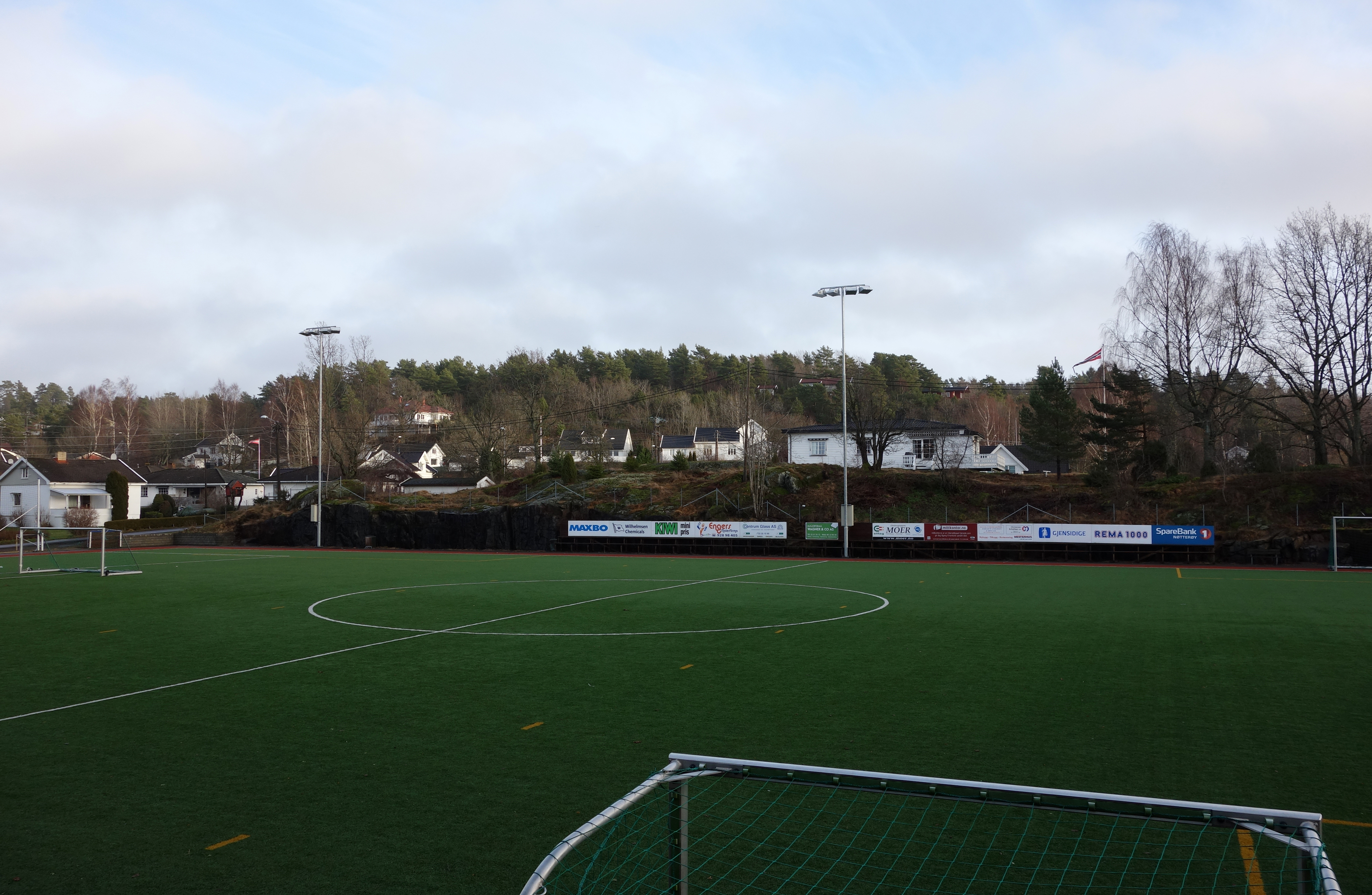 Kunstgressbanen på Tømmerholt på Nøtterøy